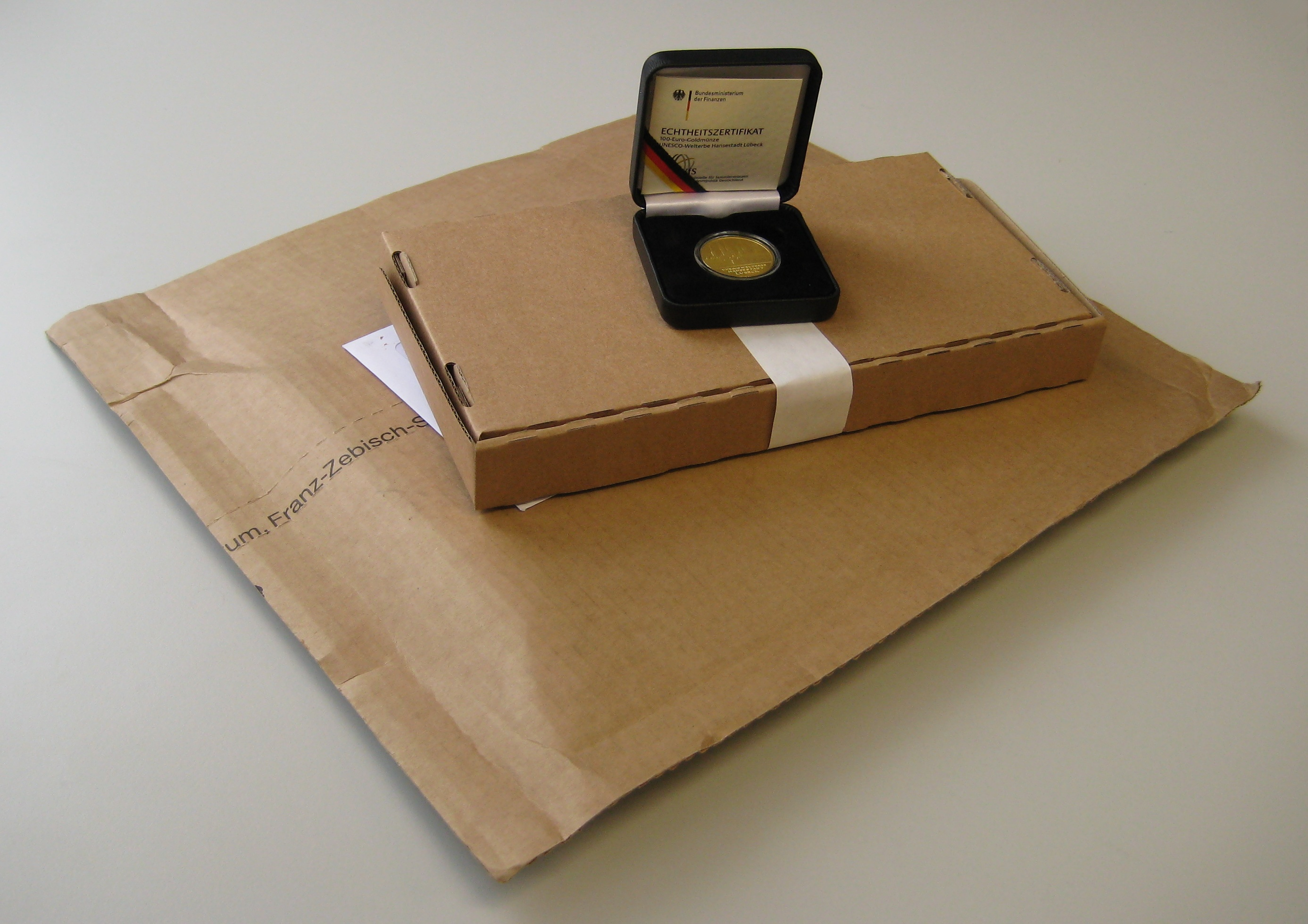 Verpackung German Gold Euro 2007